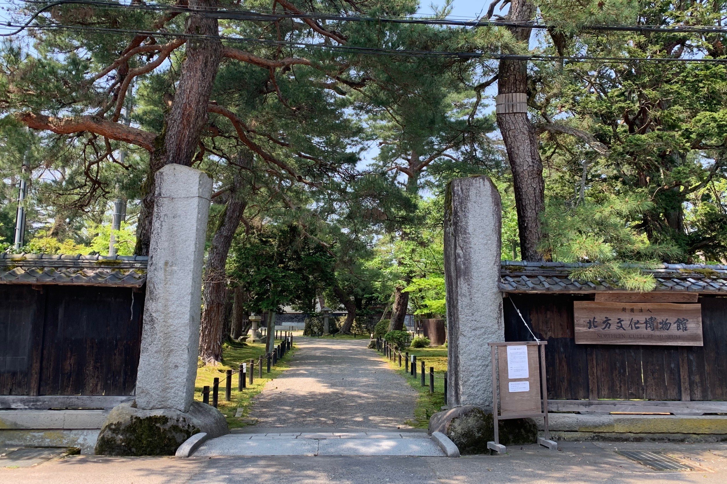 北方文化博物館入口（2020年5月）